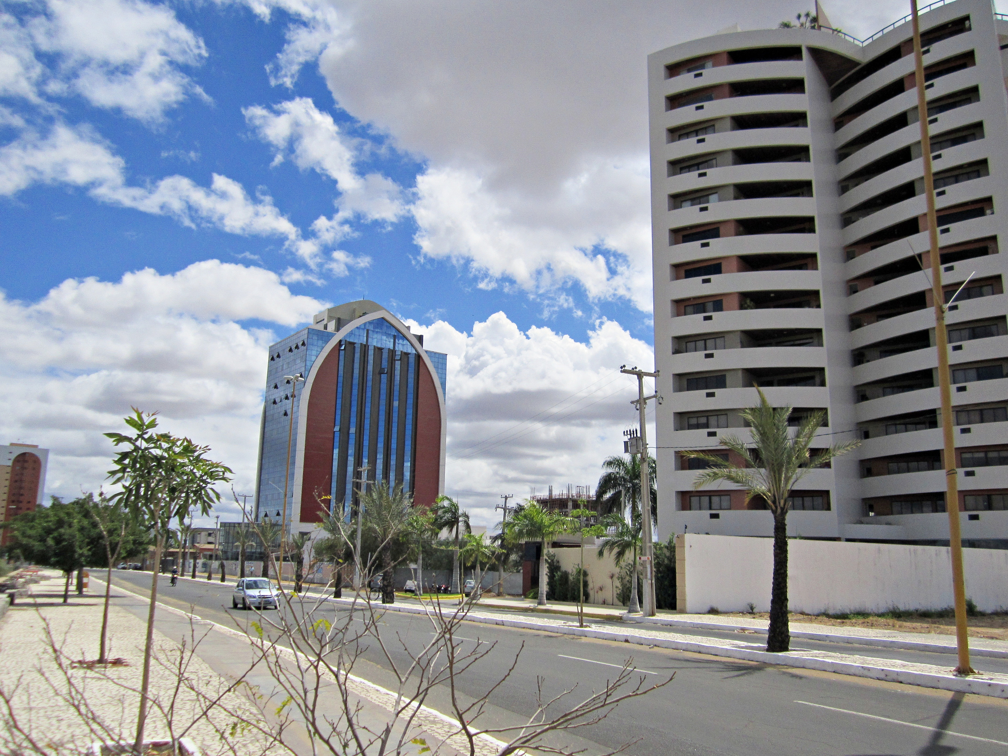 Orla II - Petrolina, Pernambuco, Brasil